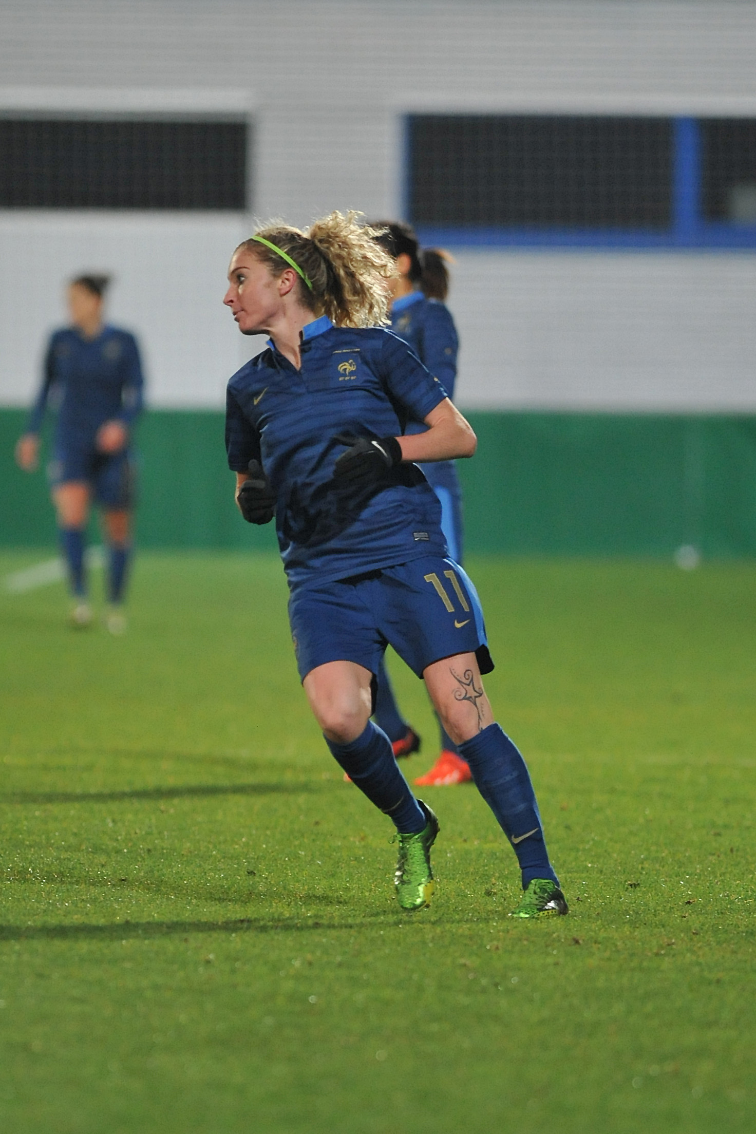 FIFA Women's World Cup 2015 Qualiying Round Österreich - Frankreich am 31. Oktober 2013 in Ritzing: Laëtitia Tonazzi